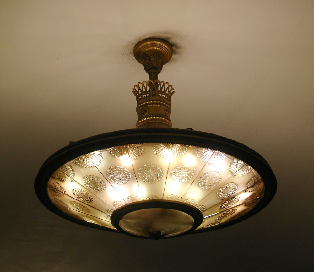 Lighting, Novoslobodskaya station